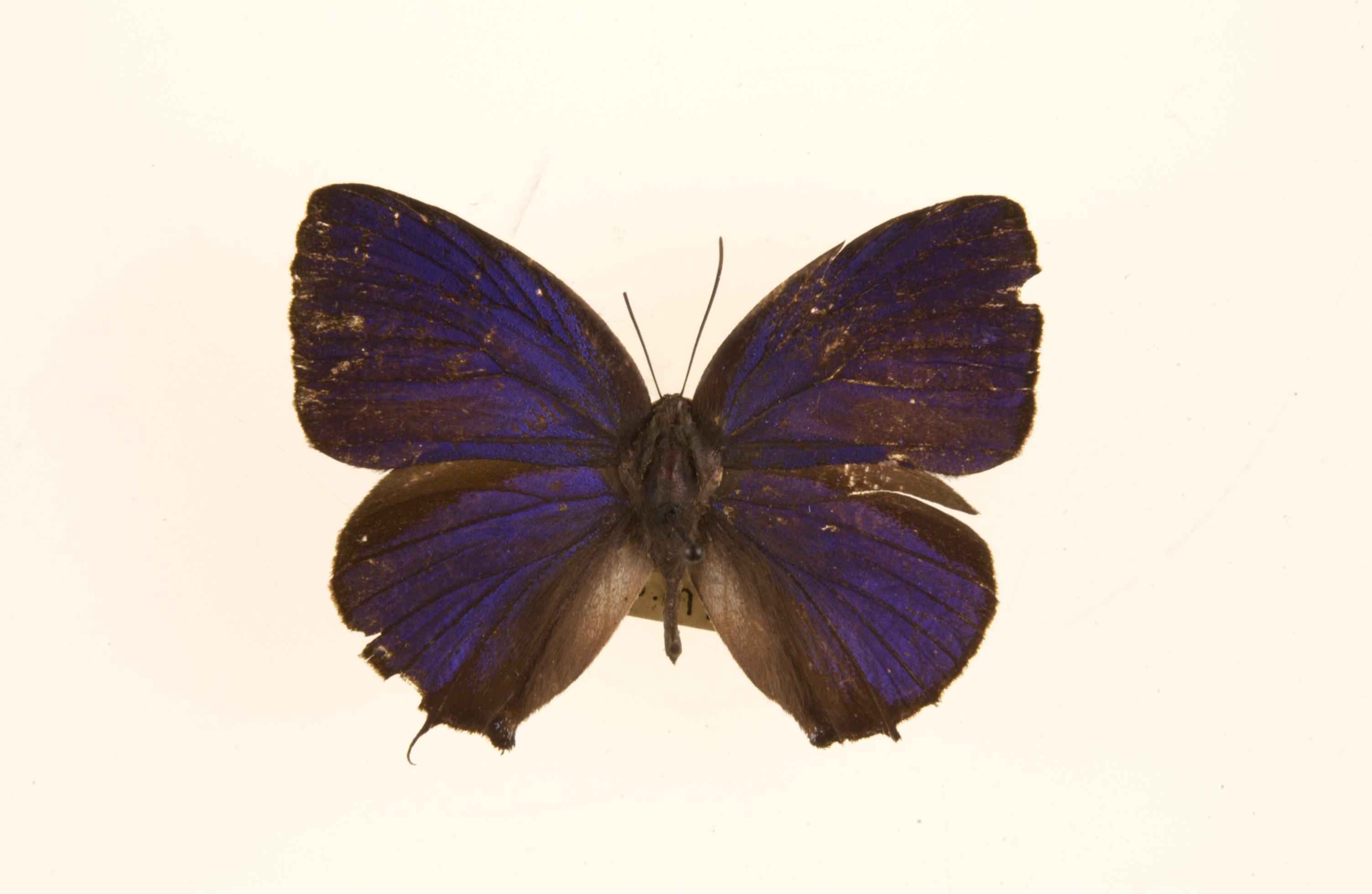 Arhopala silhetensis female